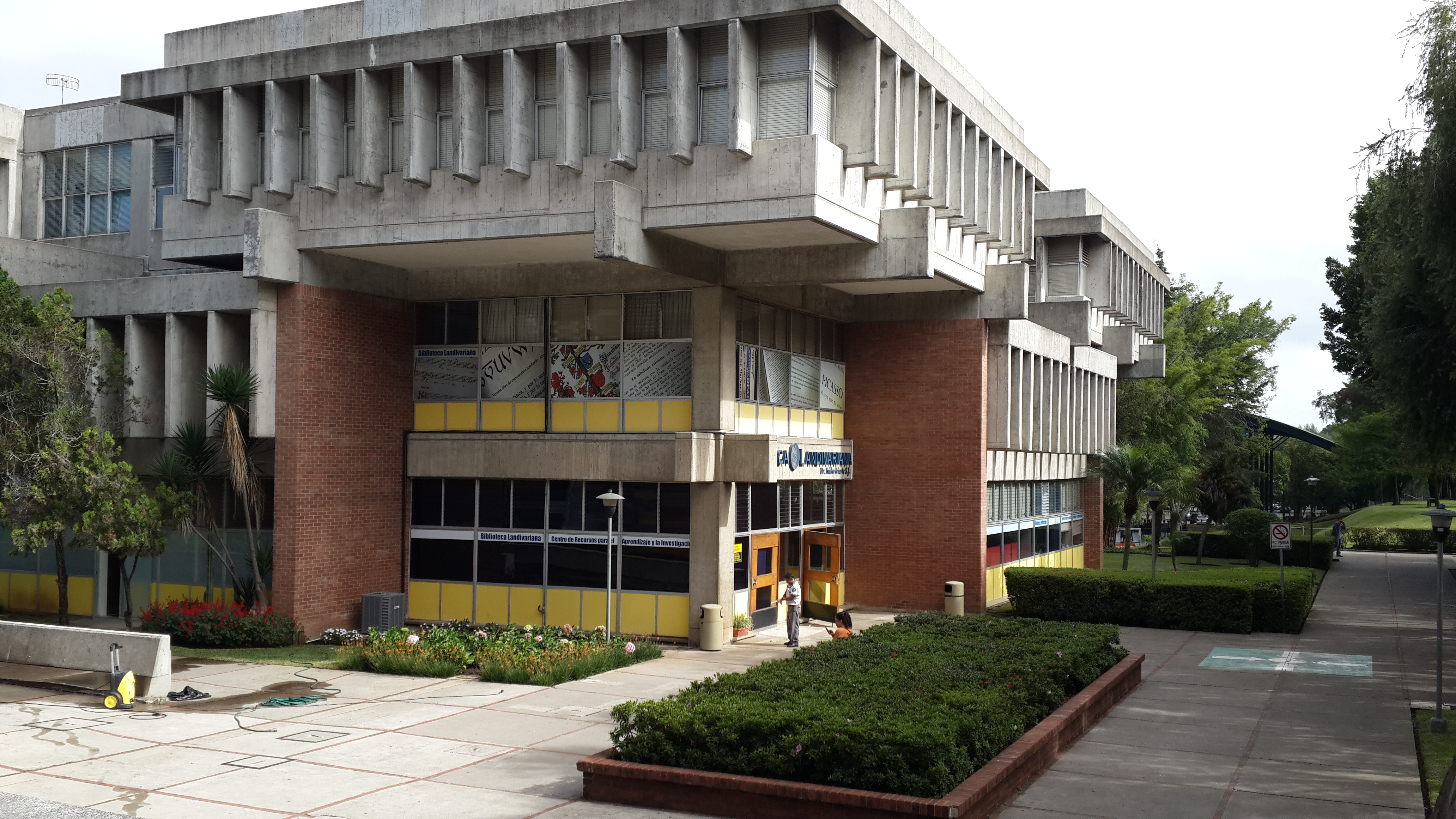 Edificio de la Biblioteca Landivariana Dr. Isidro Iriarte, Universidad Rafael Landivar, Guatemala